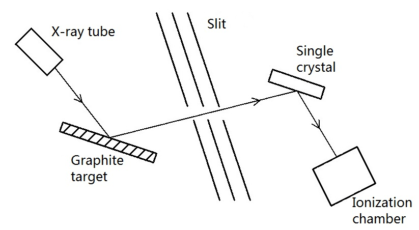 コンプトンの実験図